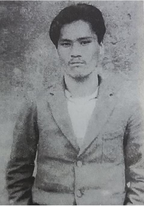 义士尹奉吉